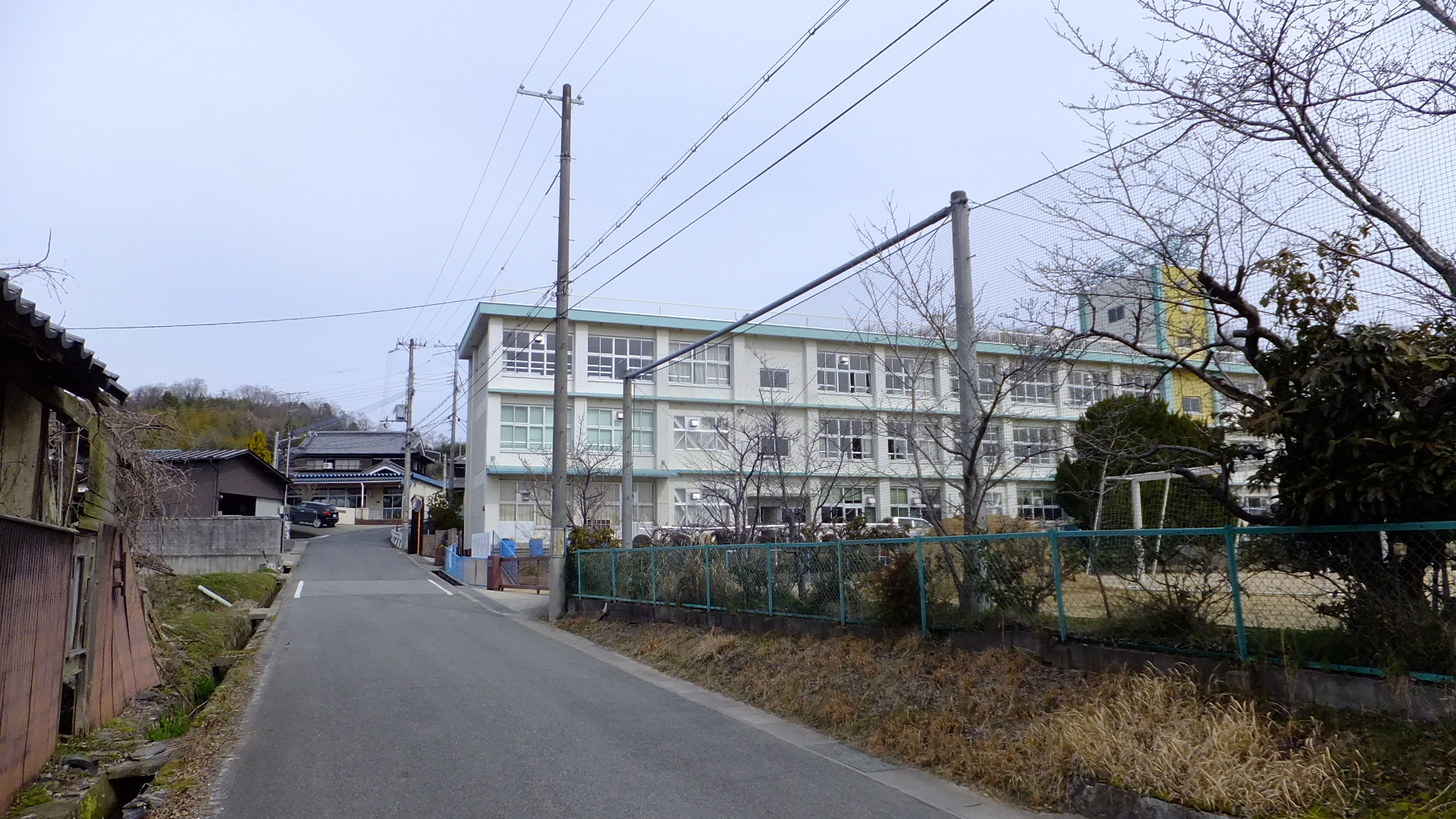 三木市立口吉川小学校